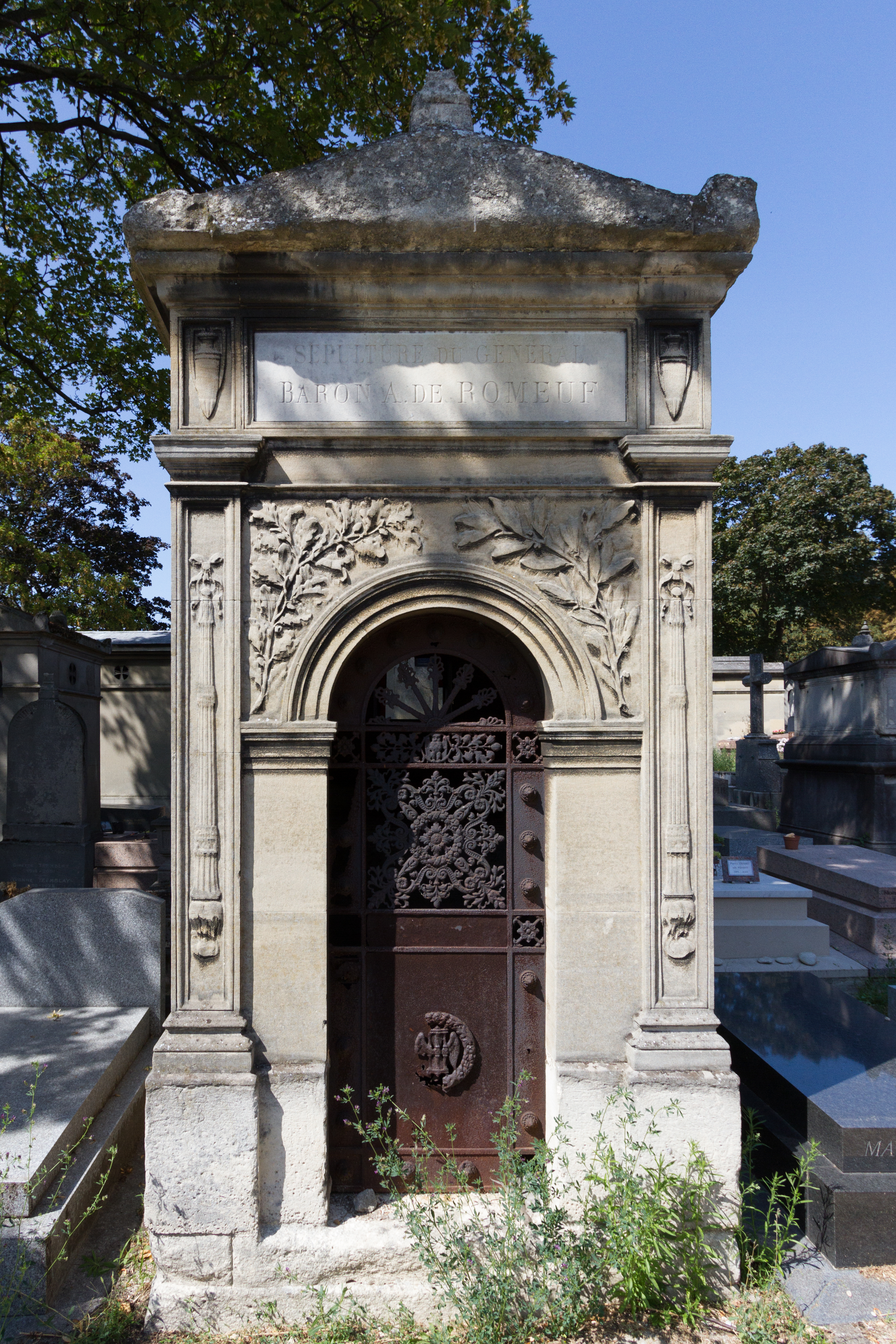 Sépulture de Jacques Alexandre Romeuf (1772-1845).